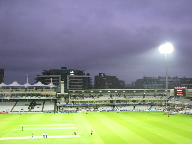 Middlesex vs Kent at Lord's